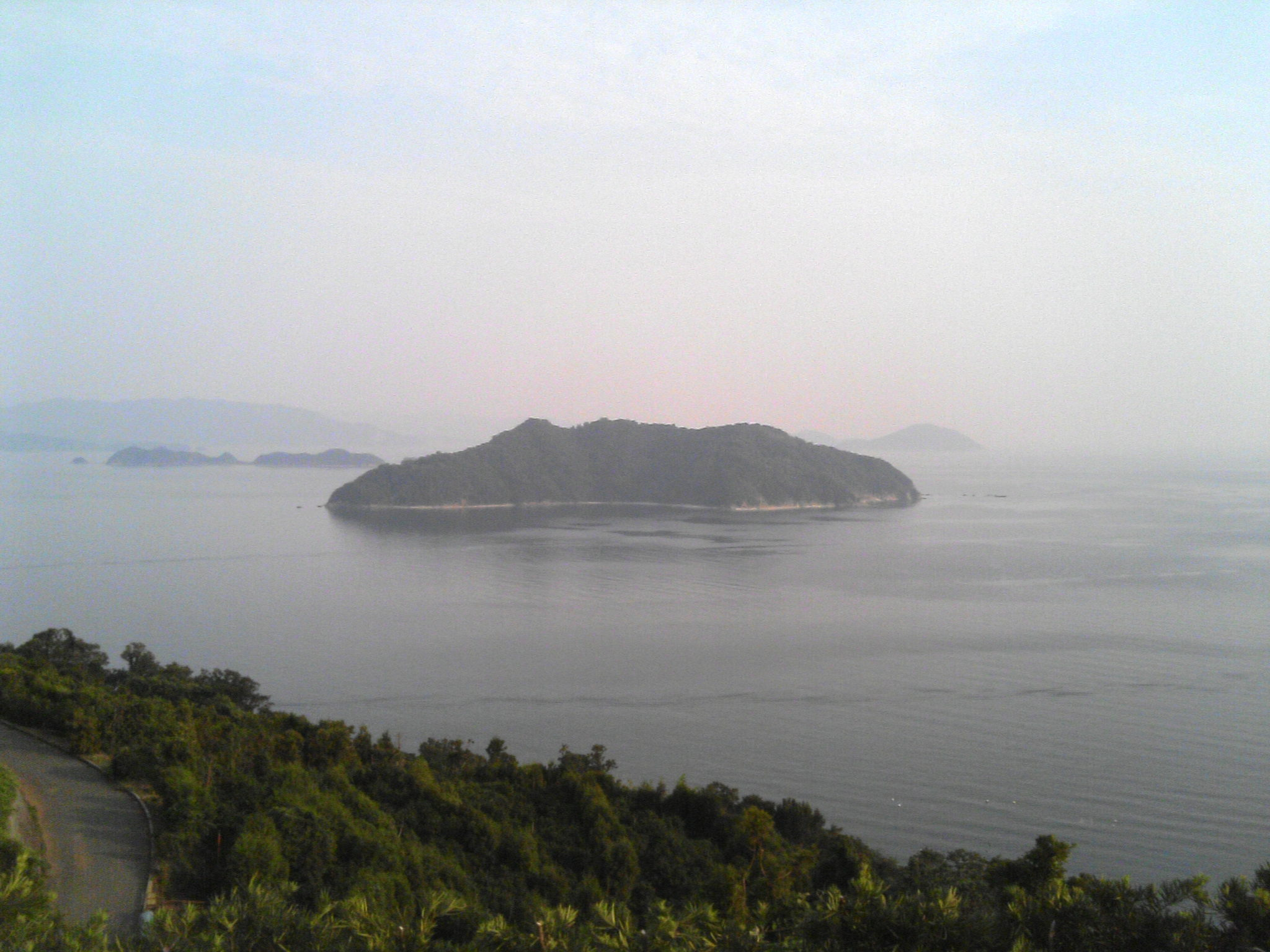 Kuroshima island, part of Ikata, Ehime, Japan